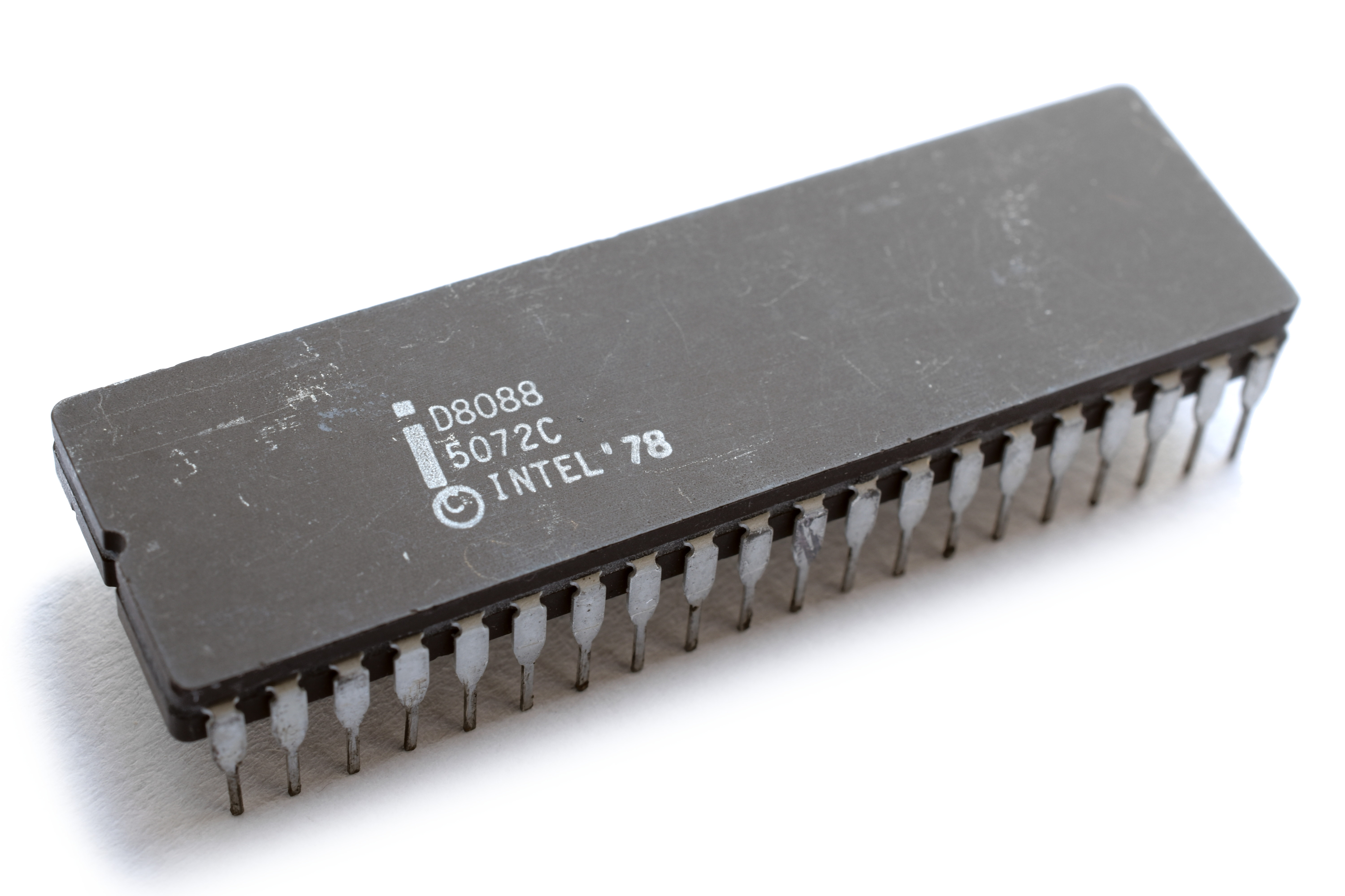 Procesoro Intel D8088.